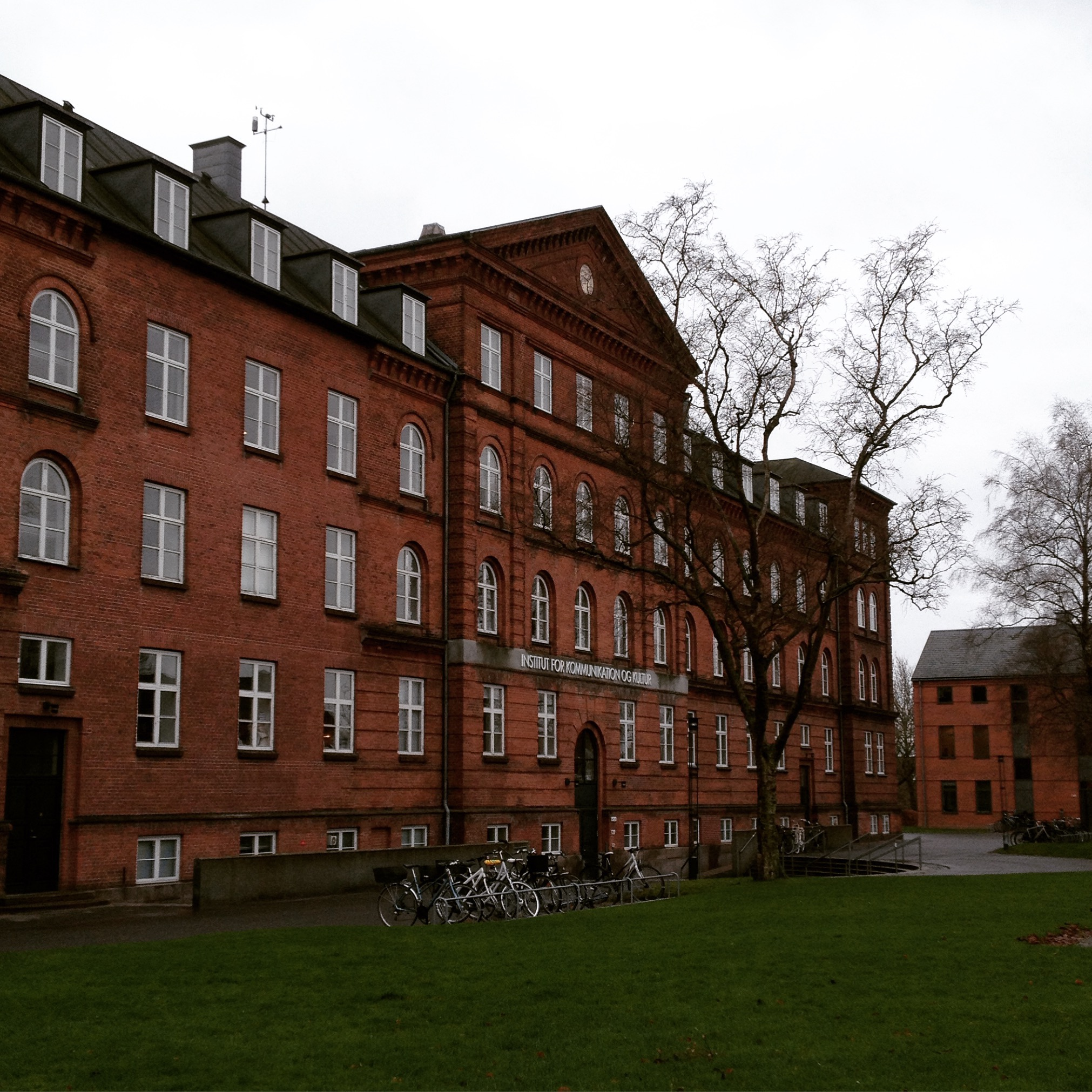 Hovedbygningen på Kasernen, december 2015.